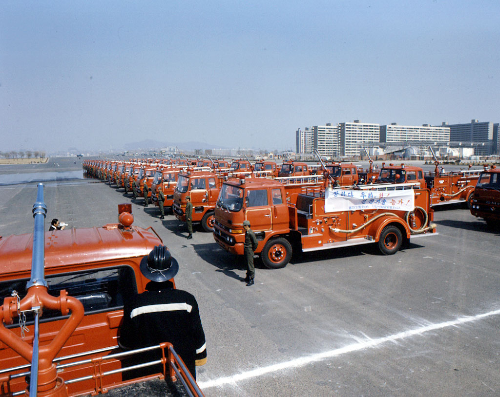 최초 국산소방차 인수식(The First Domestic-made Fire Trucks Ceremony)이 1977년 3월 28일 여의도광장에서 거행되었다. 김치열 내무부 장관을 비롯한 관계자들이 참석한 자리에서 소방차 36대, 화학차 6대에대한 성능시험이 있었다. 내무부에서 소방차의 부족과 장비의 근대화를 달성하기 위하여 1976년 9월 우리나라 최초로 48대의 국산 소방차를 하동환 자동차 공업주식회사에 발주한 것이 결실을 맺은 것이다. 그때까지 각종 소방차량을 외국에만 의존해 오던 것을 국산화 소방차로 대체하게된 계기가 되었다.